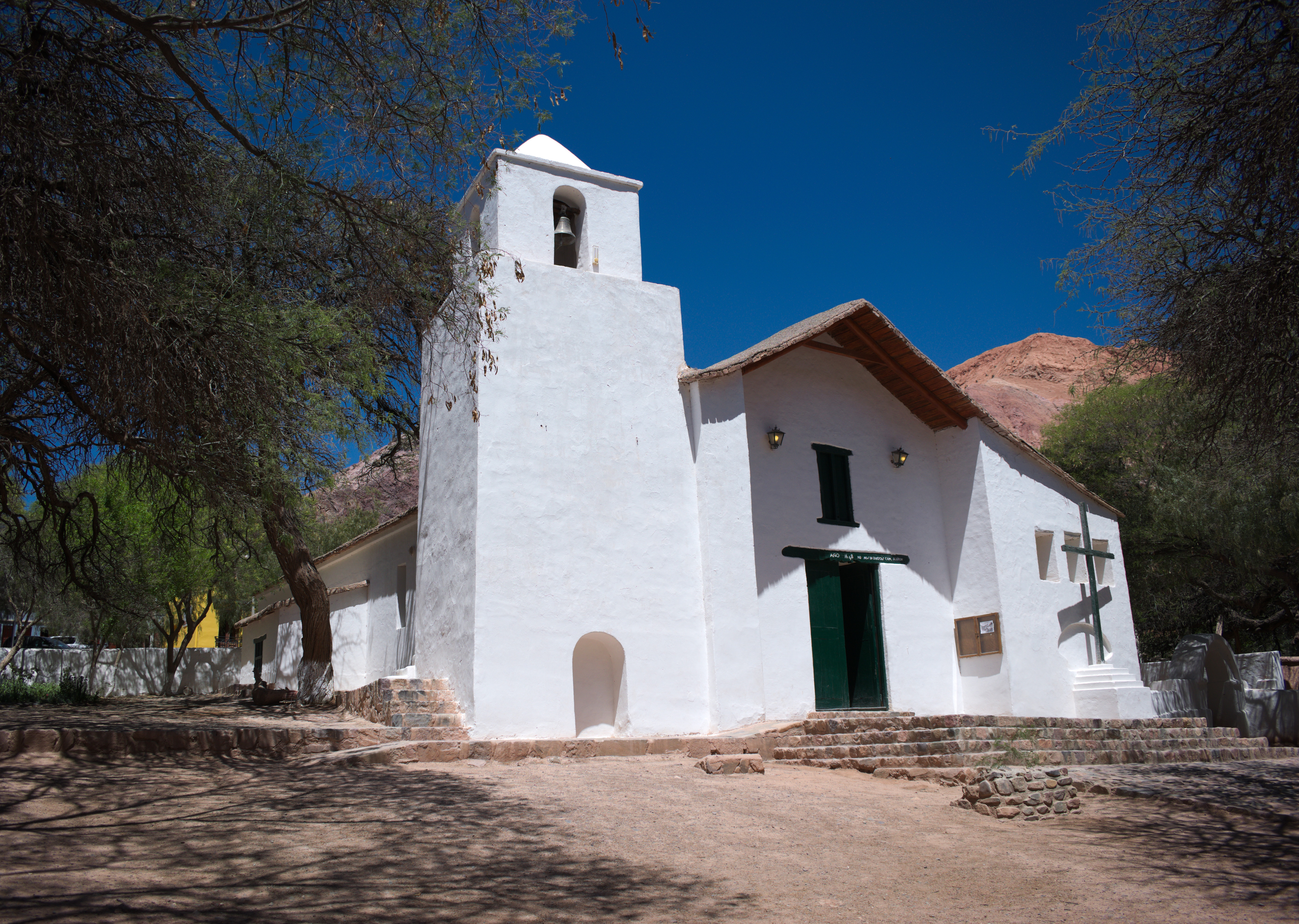 Fachada de la iglesia de Santa Rosa de Purmamarca (Jujuy, Argentina)